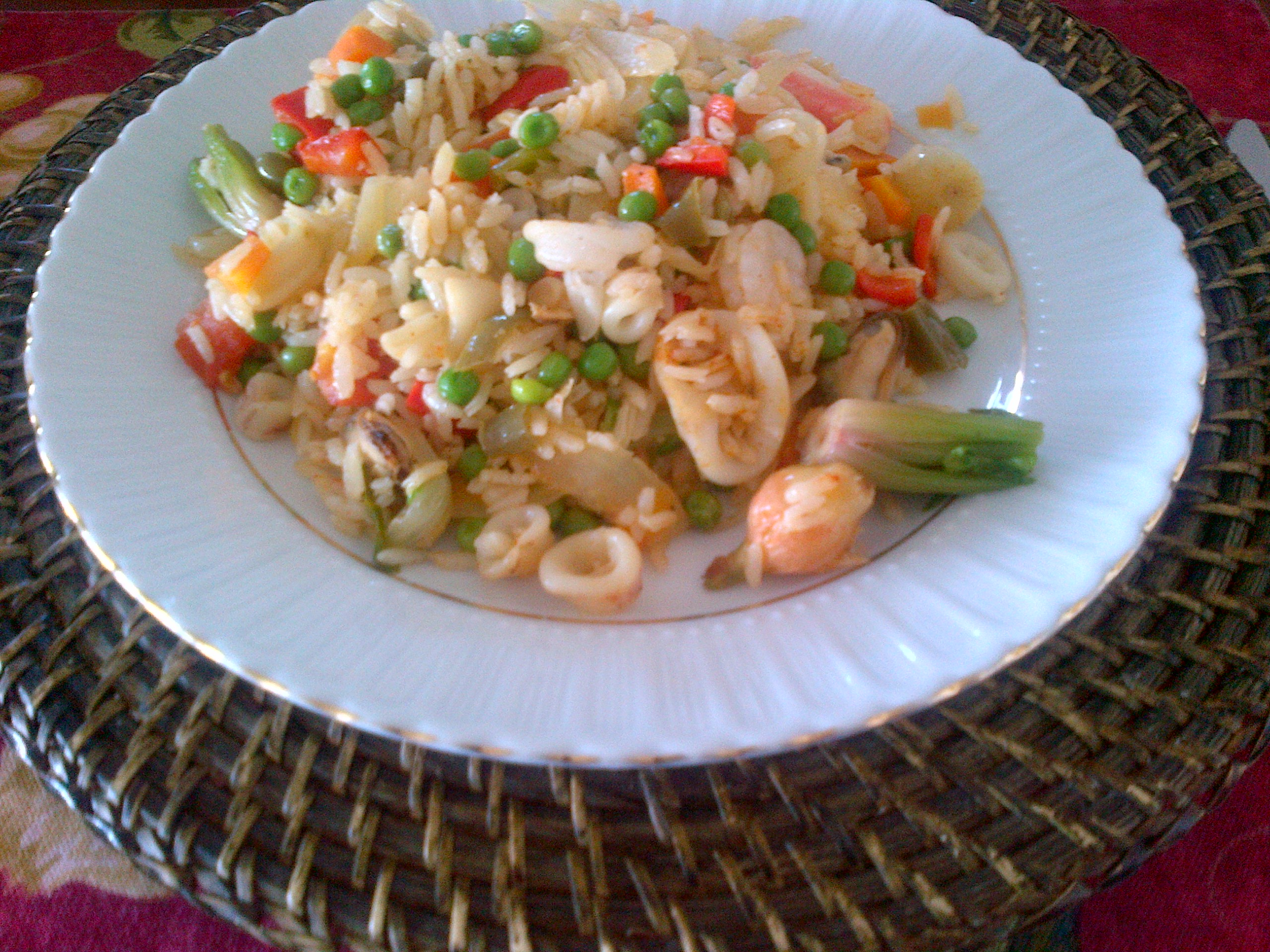 "Arroz a la valenciana" es un plato de arroz de la cocina chilena con verduras y mariscos, parecida a la paella, pero sin azafran. Si no se usan mariscos, se le llama "arroz a la jardinera".